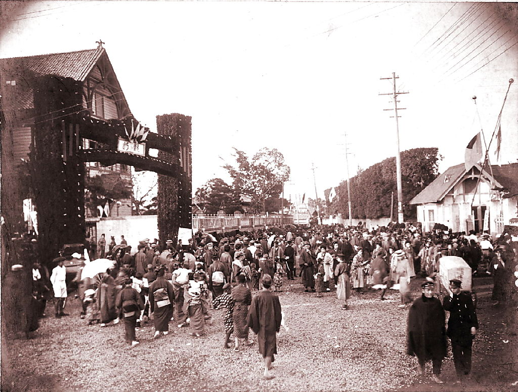 Entrée principale de l'université Waseda en 1913